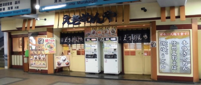 Ekimennya (Keikyū Tsurumi Station, Yokohama, Japan)